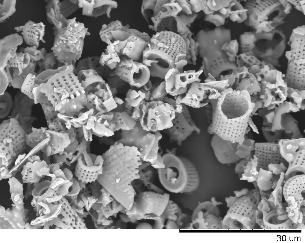 Zdjęcie SEM ziemi okrzemkowej/SEM photo of diatomaceous earth